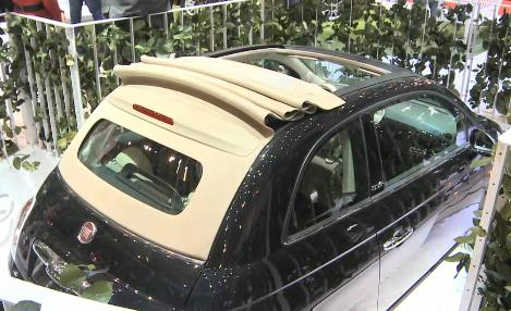 Fiat 500C Cabriolet au Salon de Genève 2009.